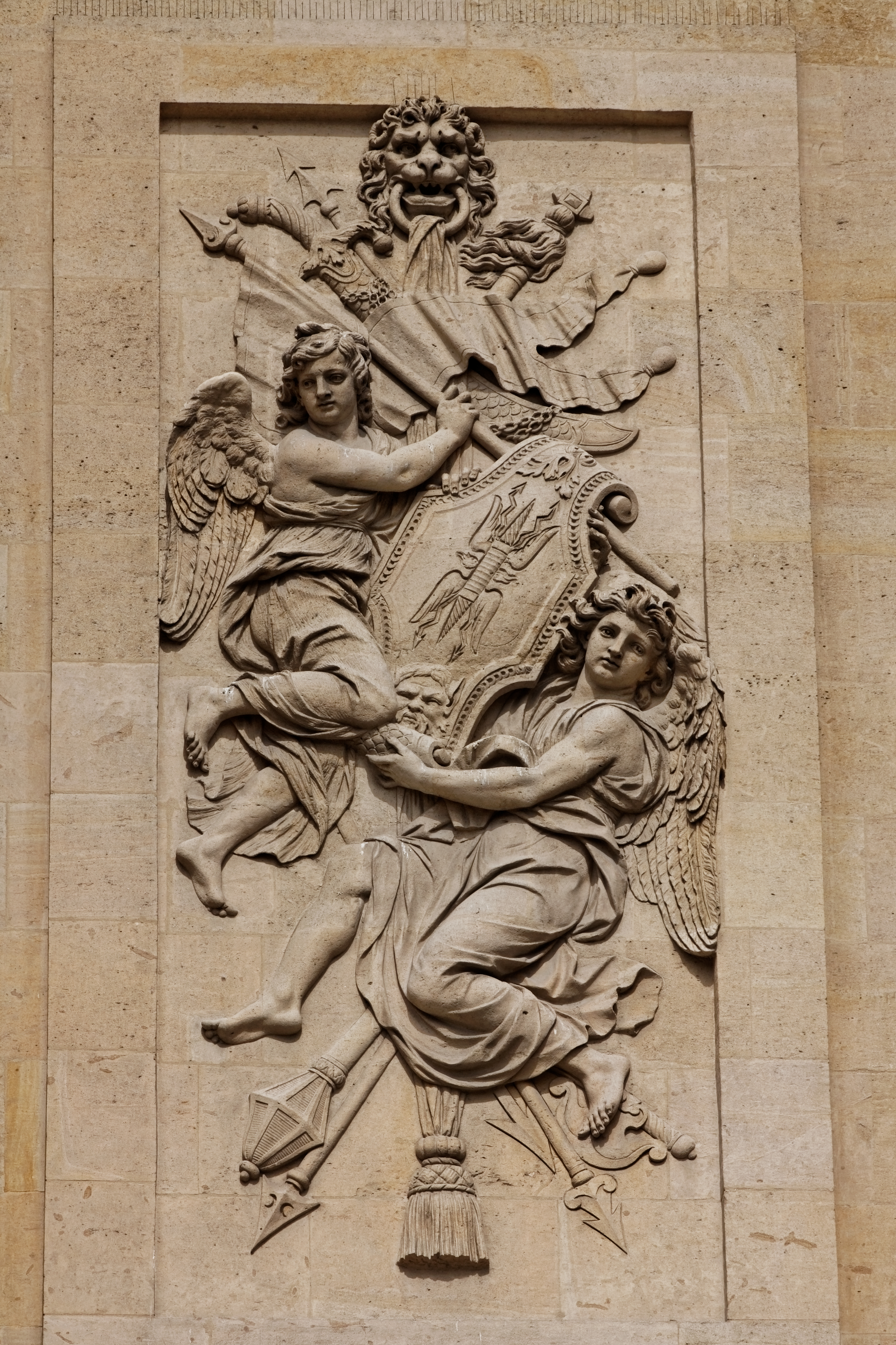 Un bas-relief sur la façade du Dôme des Invalides, Paris, France.